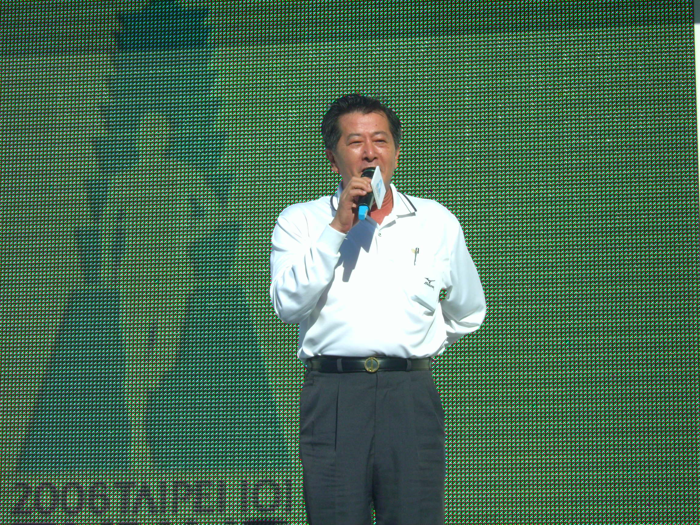 Mizuno Taiwan General Manager Masashi Kusumoto (楠本真司)